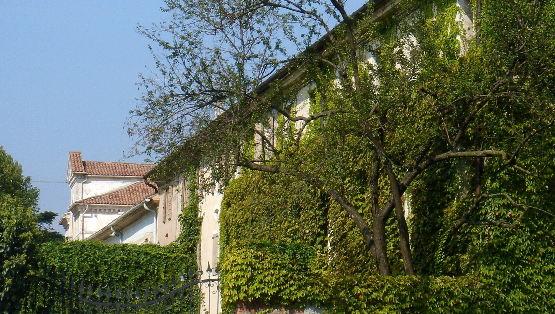 Parè di Conegliano (Treviso): veduta del complesso di Villa Gera (XVIII secolo) dalla zona industriale di Campidui, della quale il complesso della villa è parte.